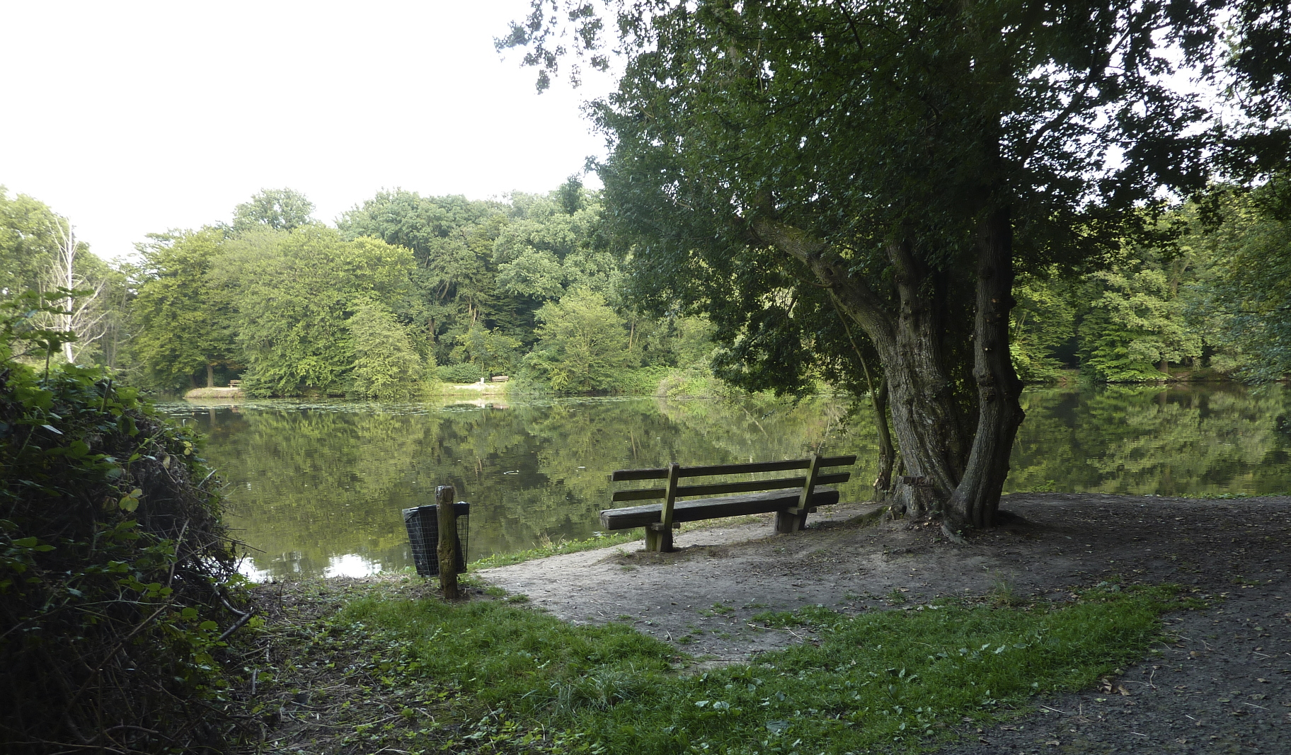 Stadt Frankfurt am Main, Stadtteil Nied: Durch den kommunalen Forst Niedwald im Nordosten des Stadtteils verlaufen an dessen nördlichem Rand zwei linke Altarme des Flusses Nidda – der Grill’sche Altarm und die Waldspitze. Beide entstanden bei der Begradigung des Flusses in den 1920er-Jahren und sind heute Biotope. Das Foto zeigt den Grill’schen Altarm, mit 29.000 m² Wasserfläche der größte an der Nidda. Ansicht vom Westufer aus, Blick nach Südosten